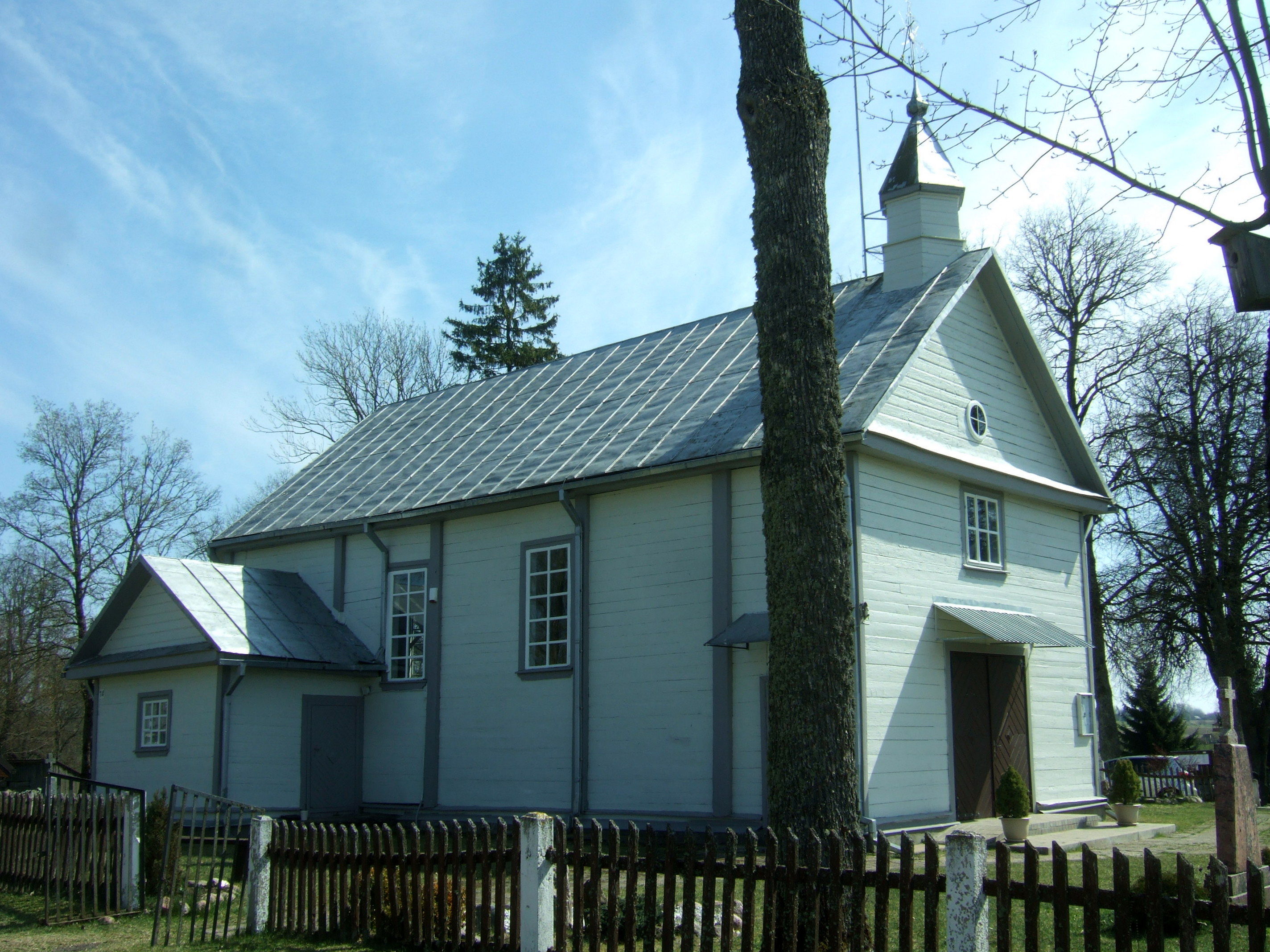 Zibalų bažnyčia 2019-04